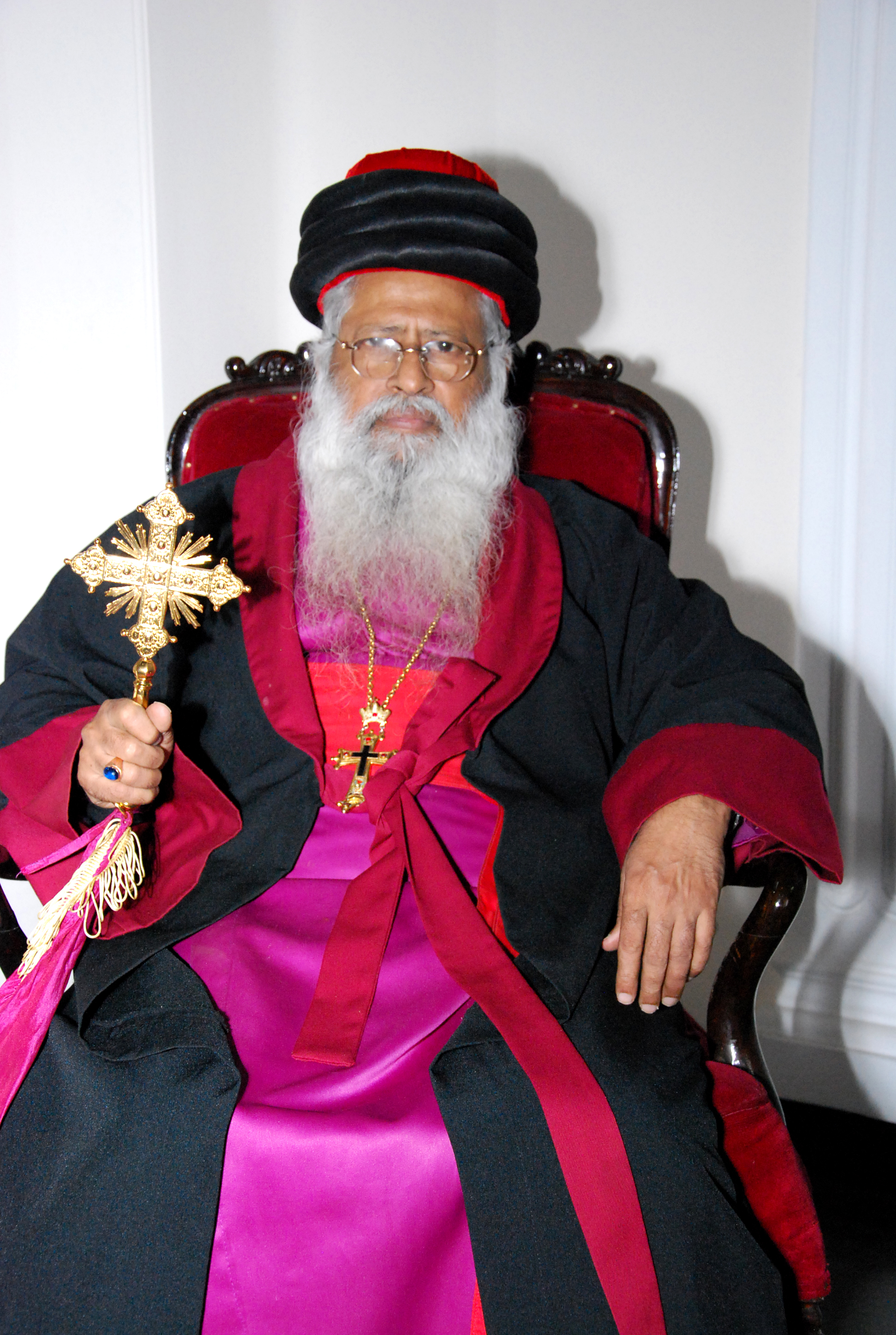 മാര്‍ അപ്രേം മെത്രാപ്പോലീത്ത മലബാരിന്റെയും ഇന്ത്യയുടെയും മെത്രാപ്പോലീത്ത ഇപ്പോള്‍ പാത്രയര്‍കീസ് സിംഹാസന സംരക്ഷകന്‍